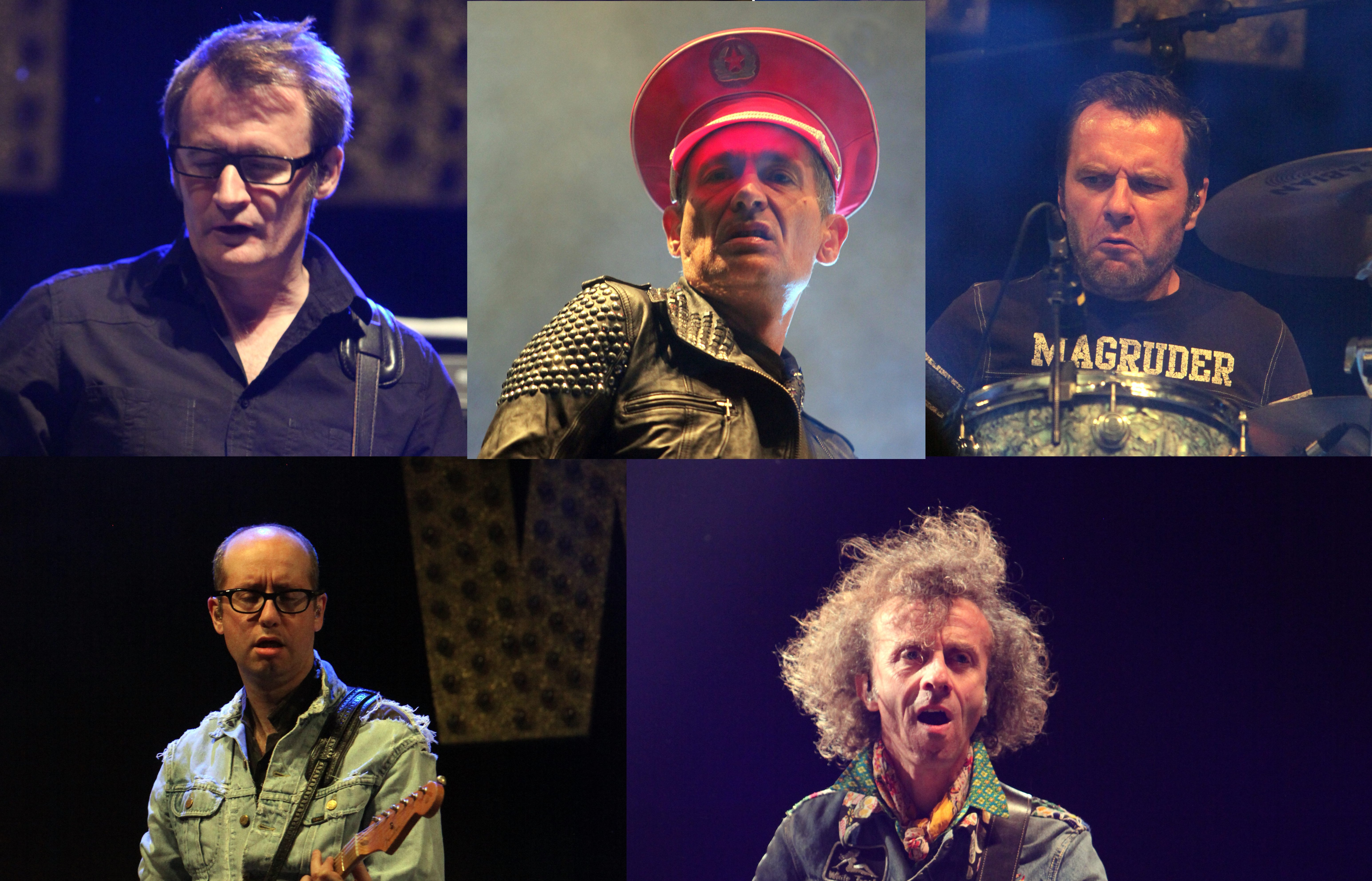 Les Wampas at Balelec 2011